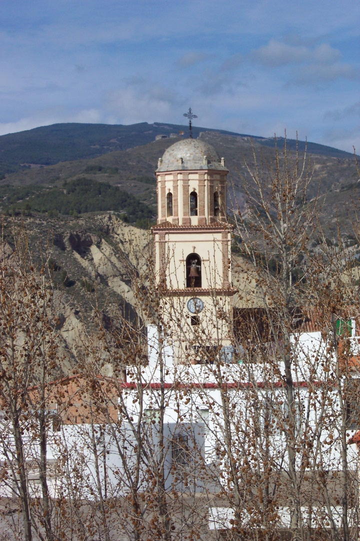 Torre de la iglesia de Alcolea, siglo XVI Torre de la iglesia de Alcolea de Almería Fotografía realizada por José Manuel Escudero, febrero de 2003.